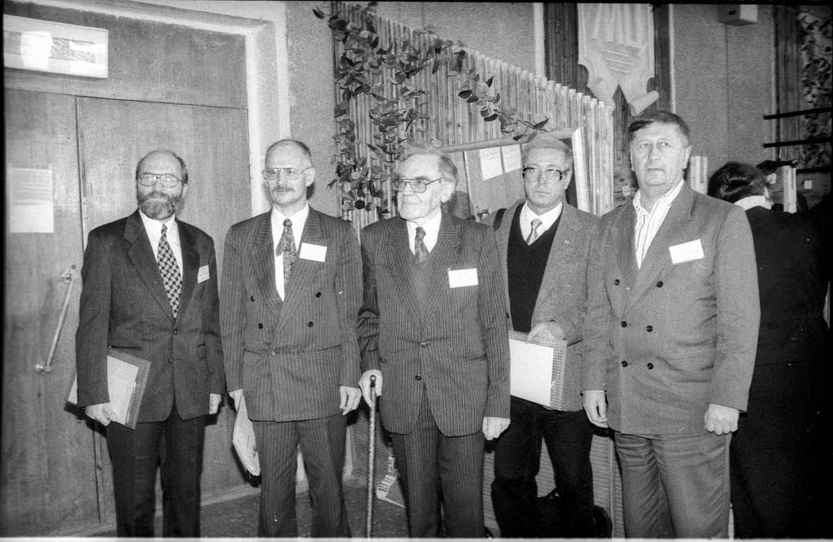 Историки на конференции «Малые города России». Переславль, улица Свободы, дом 46, кинотеатр «Восток». Слева направо: Владимир Фотиевич Козлов (профессор, заведующий кафедрой региональной истории и краеведения ИАИ РГГУ), Александр Александрович Черёмин (ответственный секретарь Союза краеведов России), Сигурд Оттович Шмидт (академик Российской академии образования), Сергей Борисович Филимонов (профессор, заведующий кафедрой российской истории Таврического национального университета), Михаил Николаевич Громов (профессор, заведующий сектором института философии РАН).